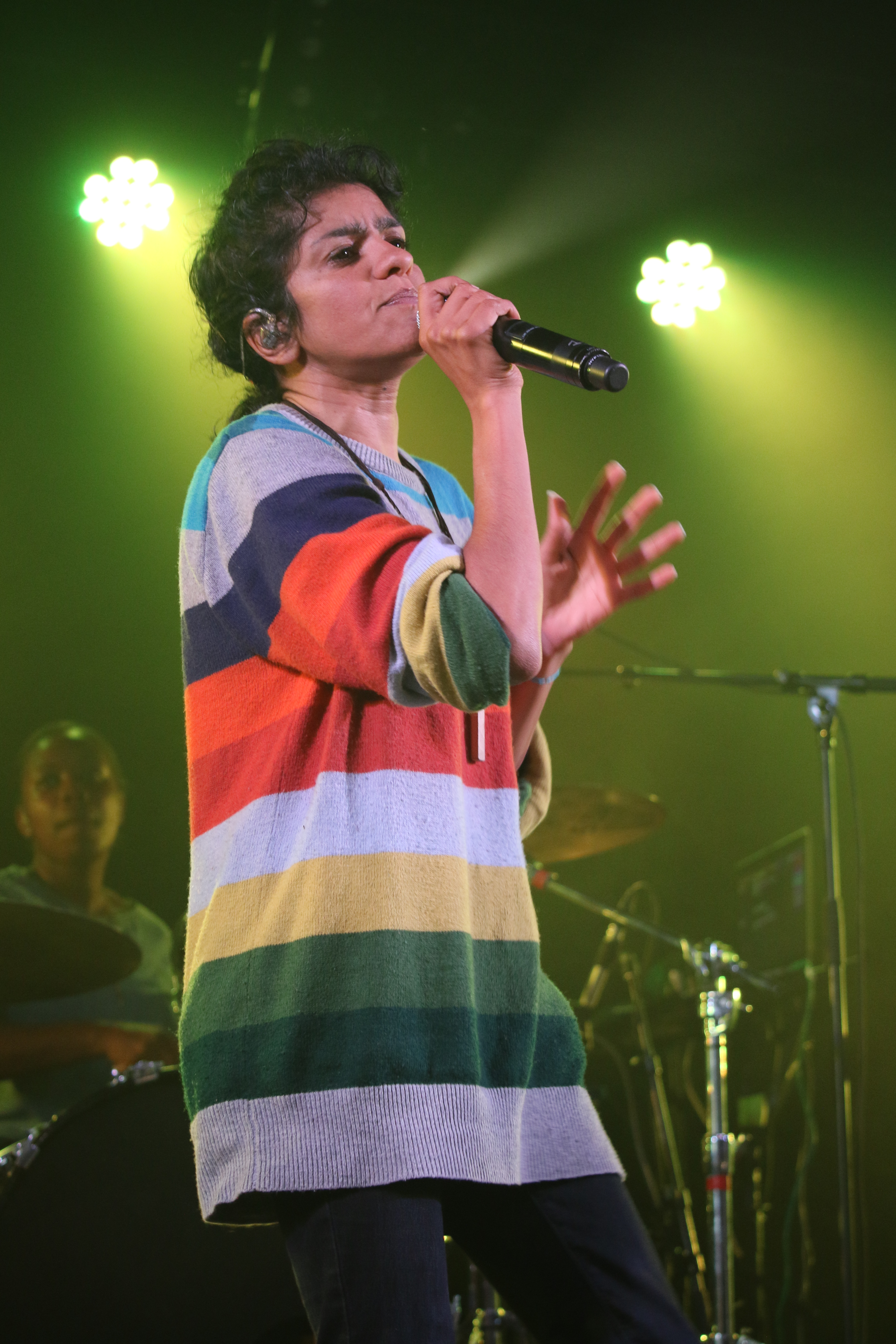 Soom T - Paléo 2016